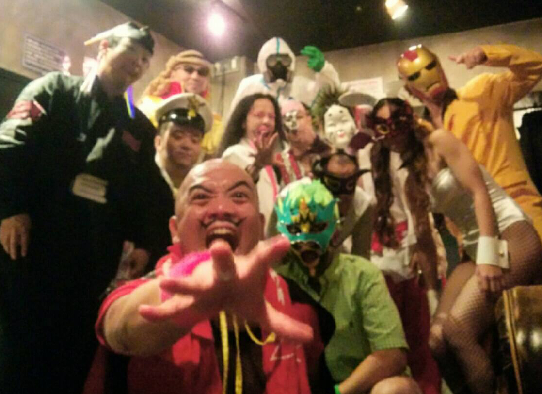 王国宮殿仮面舞踏会 淫下北沢 楽屋にて